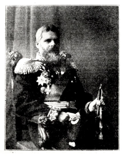 Генерал-лейтенант Русской Императорской армии Антон Францевич Бринк. Данное изображение было использовано в статье «Бринк, Антон Францович» опубликованной в пятом томе «Военной энциклопедии», который был издан книгоиздательским товариществом Ивана Дмитриевича Сытина в 1911 году в столице Российской империи городе Санкт-Петербурге.